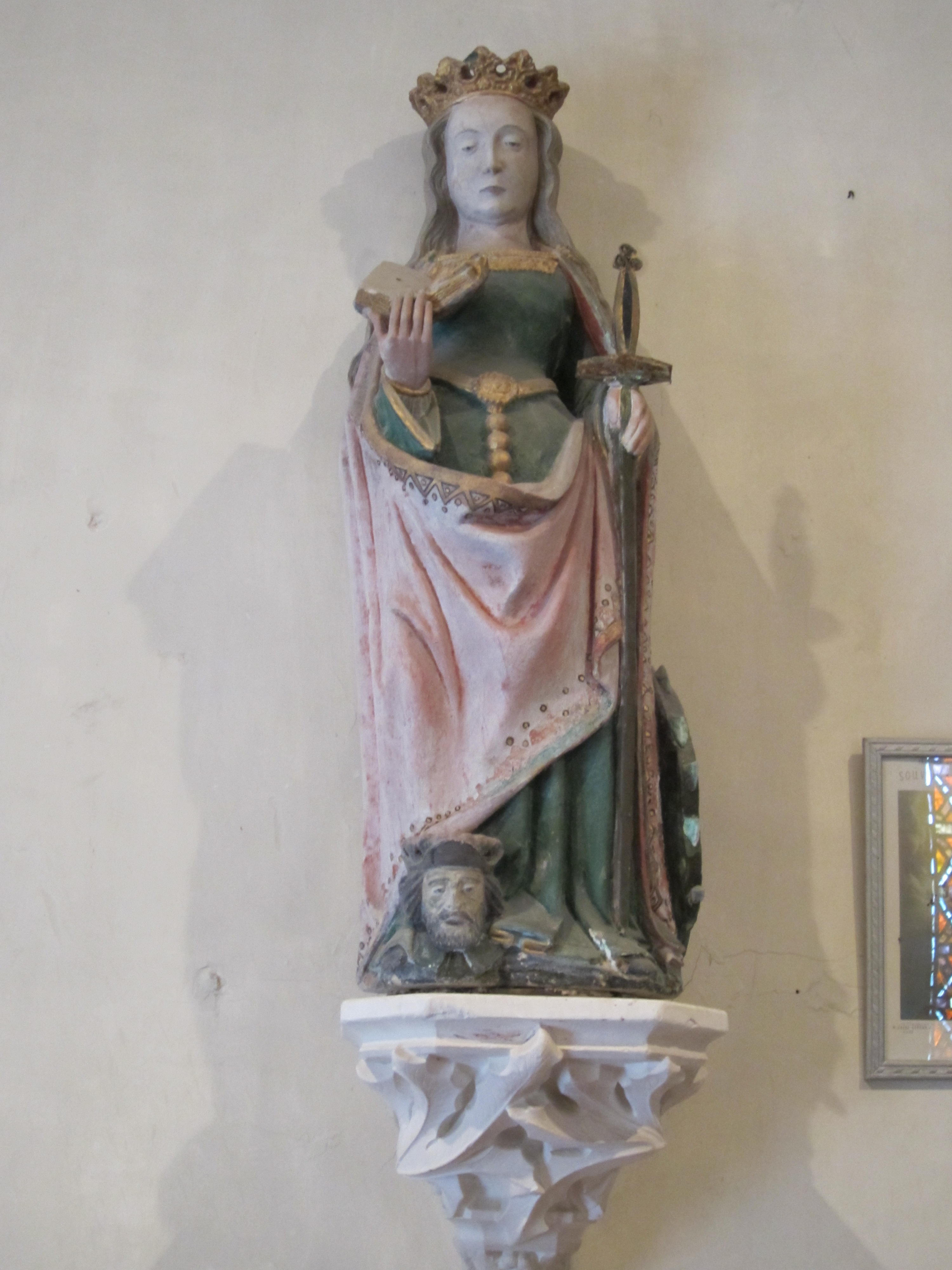 église Saint-Sébastien de Vrasville, Cosqueville, Manche